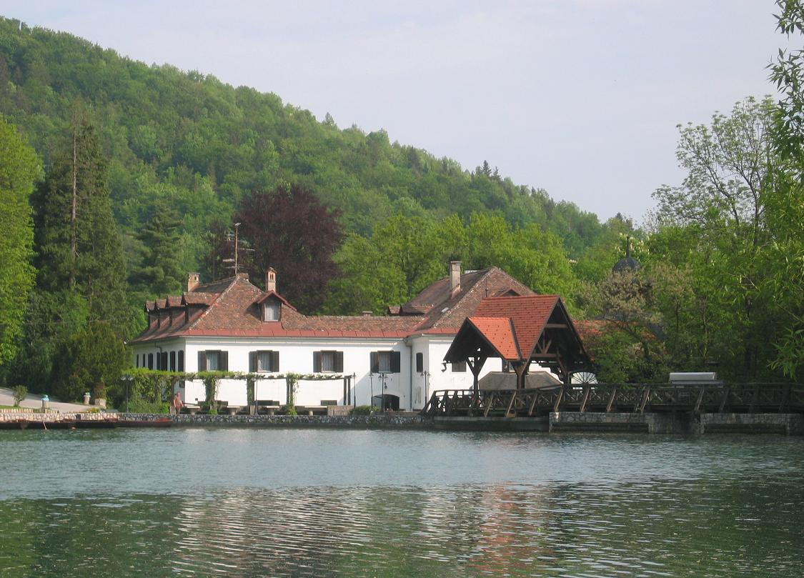 Hrib Castle, Preddvor, Slovenia photo:Ziga 19:00, 13 May 2006 (UTC)